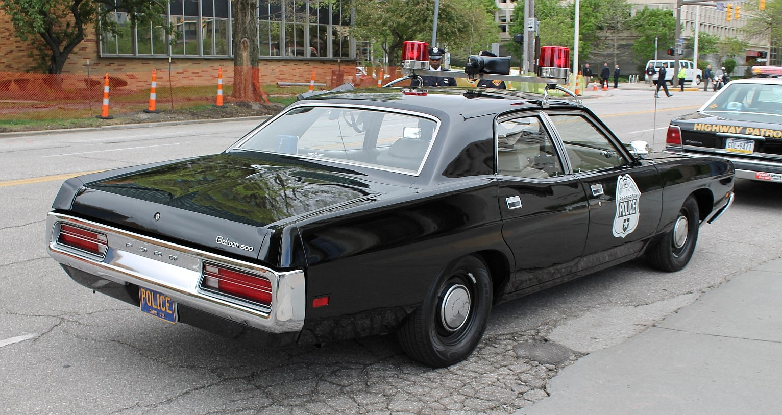 Barberton Ohio Police - Ford Galaxie 500.